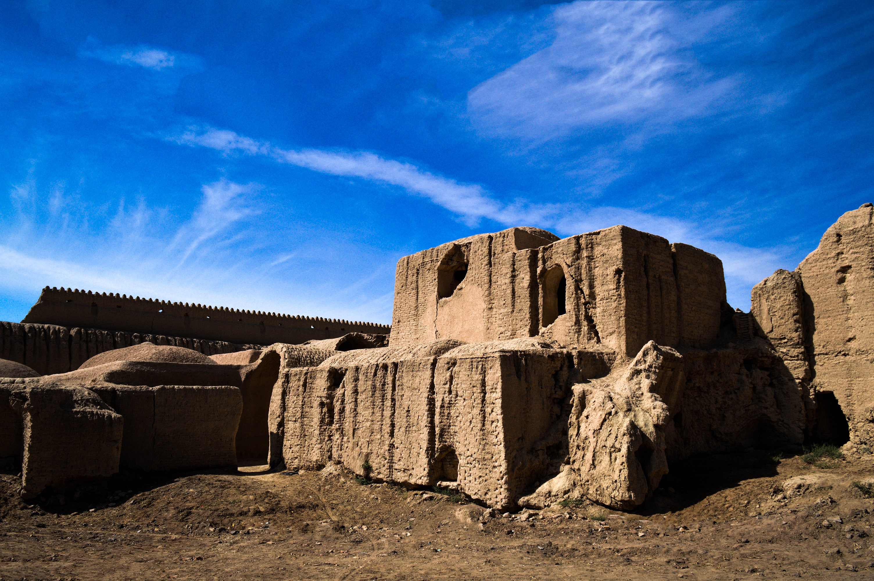 نمایی از قلعه قورتان